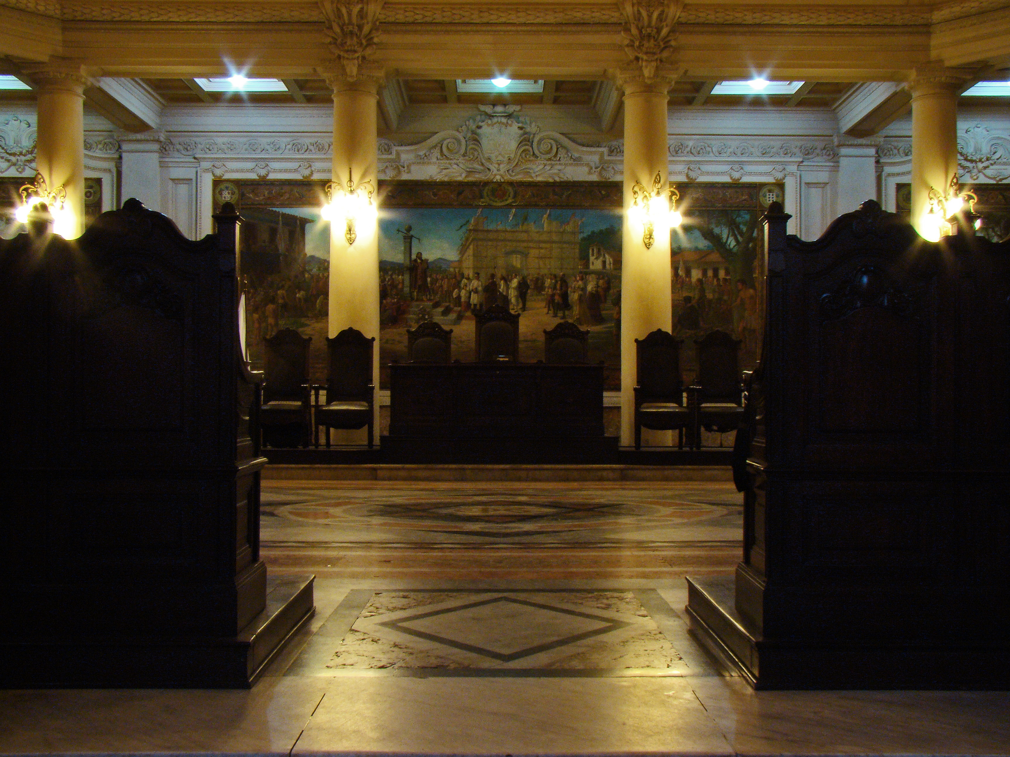 Edifício da Bolsa Oficial de Café O prédio que abrigou a Bolsa Oficial de Café e Mercadorias de Santos, hoje conhecido como Museu do Café, começou a ser construído em 1920. Ele foi inaugurado no dia 7 de setembro de 1922 em comemoração ao centenário da Independência do Brasil. O edifício foi erguido em Santos porque, na época, a cidade era a maior praça de café do mundo e muitos países só aceitavam comprar o produto se ele fosse negociado e chancelado na Bolsa Oficial de Café. O último pregão aconteceu na década de 1950, quando os negócios do café foram transferidos para a cidade de São Paulo. Mas até 1986, quando foi desativado, funcionou para a divulgação da cotação do café no mercado internacional. Depois de dez anos fechado, o Museu do Café foi restaurado em parceria com o Governo do Estado de São Paulo. Foram 14 meses de trabalho até a reinaugação em 25 de setembro de 1998. Atualmente ele é gerido pela Associação dos Amigos do Museu do Café. Entre seus principais destaques estão telas e painéis de Benedicto Calixto e o Salão do Pregão – composto por uma mesa principal e setenta cadeiras -, onde eram realizadas as negociações que determinavam as cotações diárias das sacas de café. O Museu do Café abriga exposições de longa duração e temporárias e possui ainda um Centro de Informação e Documentação – que conta em seu acervo com diversas publicações e documentos sobre o café e sua história – e o Centro de Preparação de Café, que disponibiliza cursos relacionados ao conhecimento e ao preparo da bebida.